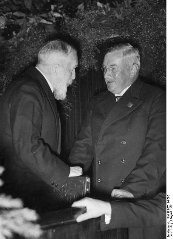 ADN-ZB / Archiv Faschistisches Deutschland 1933-1945: Internationaler Strafrechts- und Gefängniskongreß im August 1935 in der Berliner Kroll-Oper Während einer Pause im Gespräch: der deutsche Reichsminister für Justiz Dr. Gürtner (rechts) mit dem Generalsekretär Dr. J. Simon van der Aa, Professor für Strafrecht an der Universität Groningen (Niederlande).